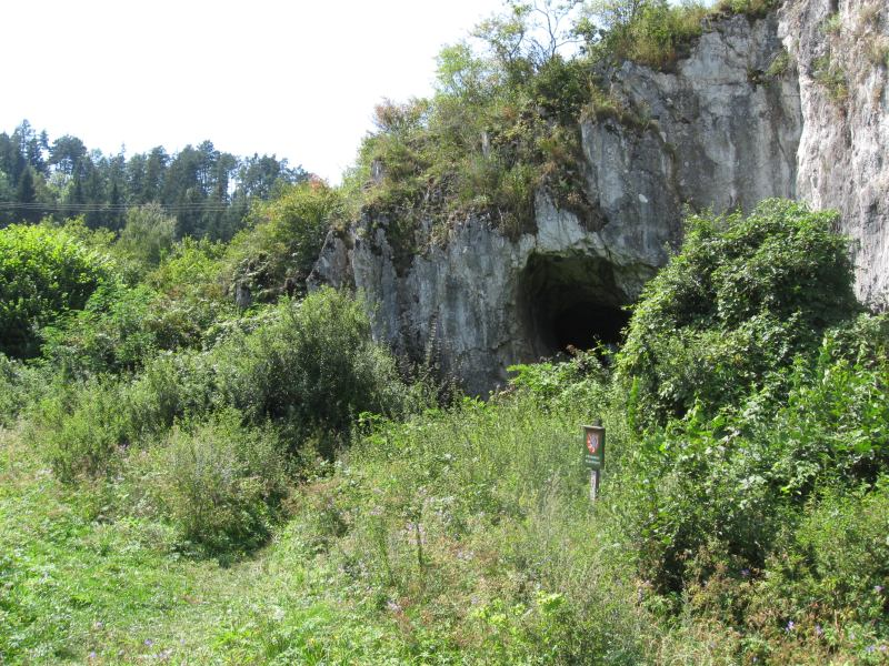 Suchý žleb - Cigánská jeskyně